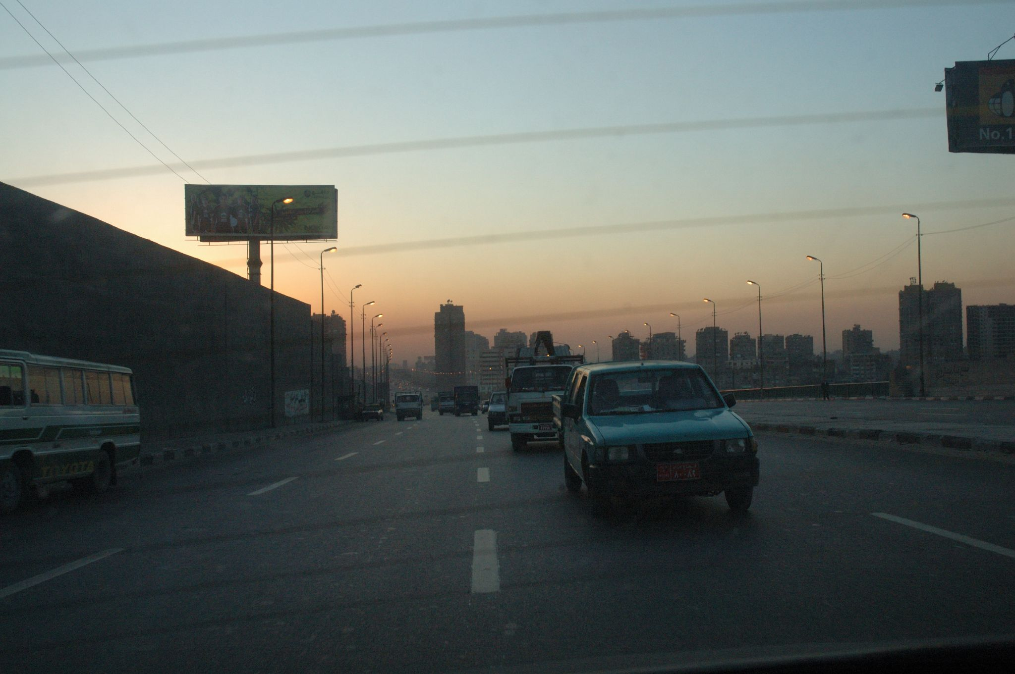 Giza: tramonto